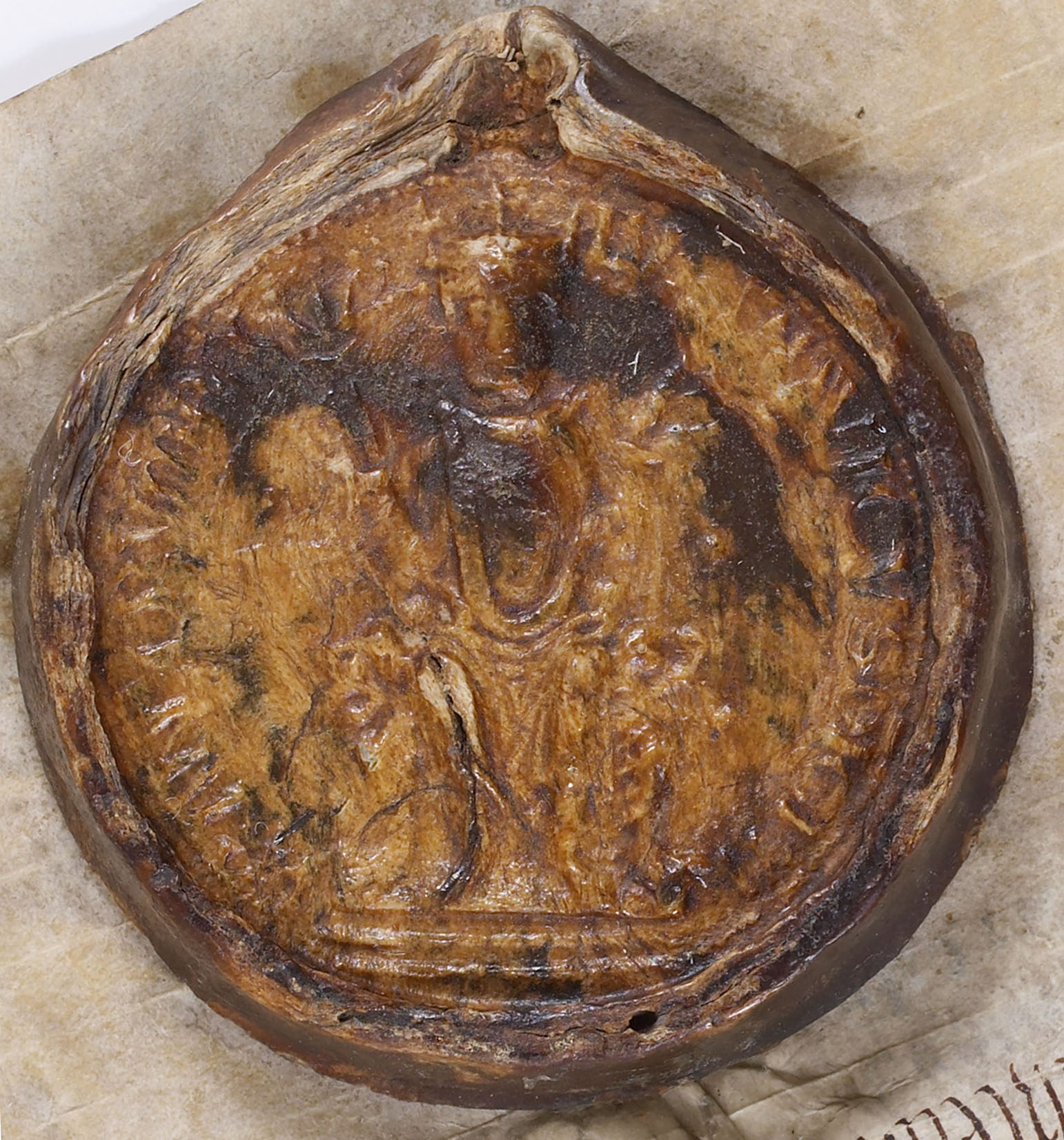 Sceau plaqué de cire brune scellant un diplôme daté de 1118 du roi Louis VI le Gros.